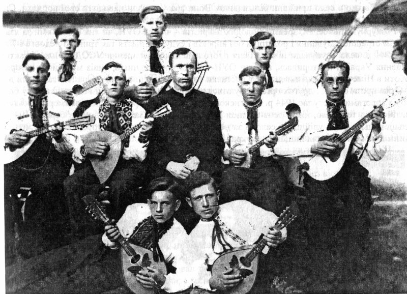 Струнний оркестр села Довге Теребовлянського району